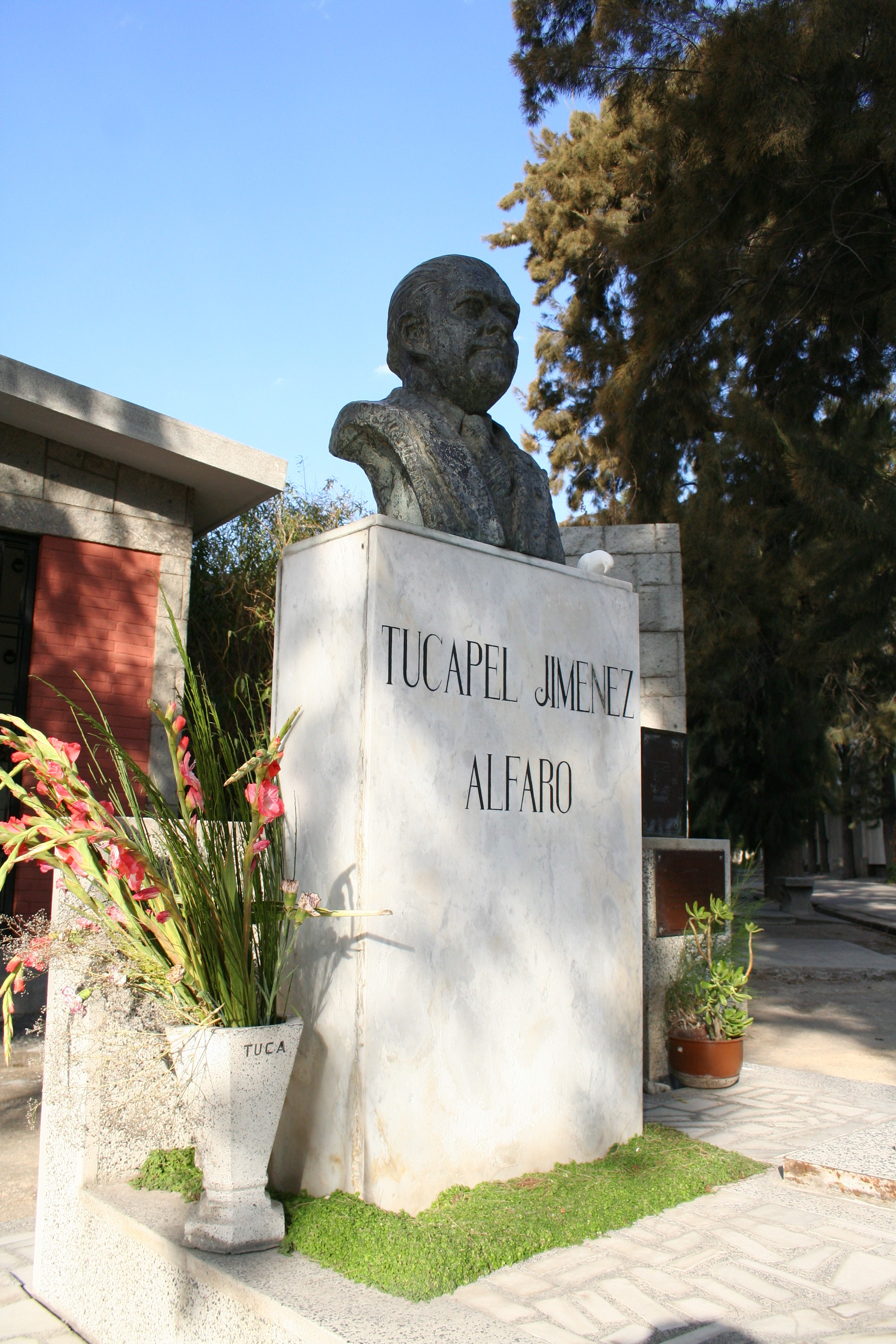 Memorial conmemorativo de la violación de los DDHH en Chile durante el régimen de Pinochet